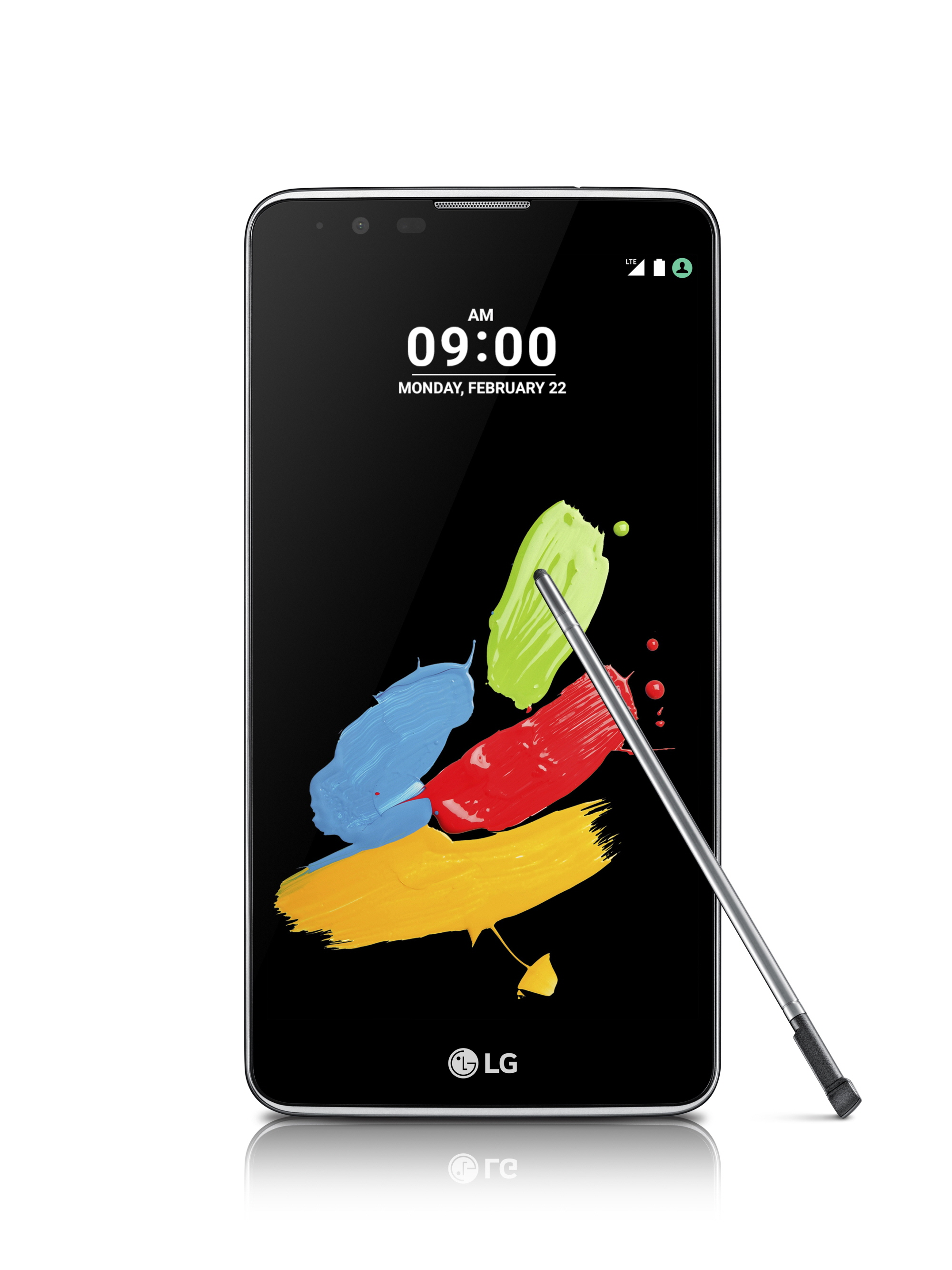 LG전자, ‘스타일러스 2’ ‘MWC2016’서 공개 “정교한 필기감 갖춘 펜 탑재” ■ 한층 업그레이드 된 ‘스타일러스 펜’으로 실제 펜과 유사한 필기감 구현 ■ 쉽고 편리하게 필기 가능한 프리미엄 사용자 경험(UX) 제공 ■ 145g 무게, 7.4mm 두께로 가볍고 슬림한 5.7인치 대화면 스마트폰 ※ Social LG전자 ( 에서 관련 보도자료를 확인하실 수 있습니다.